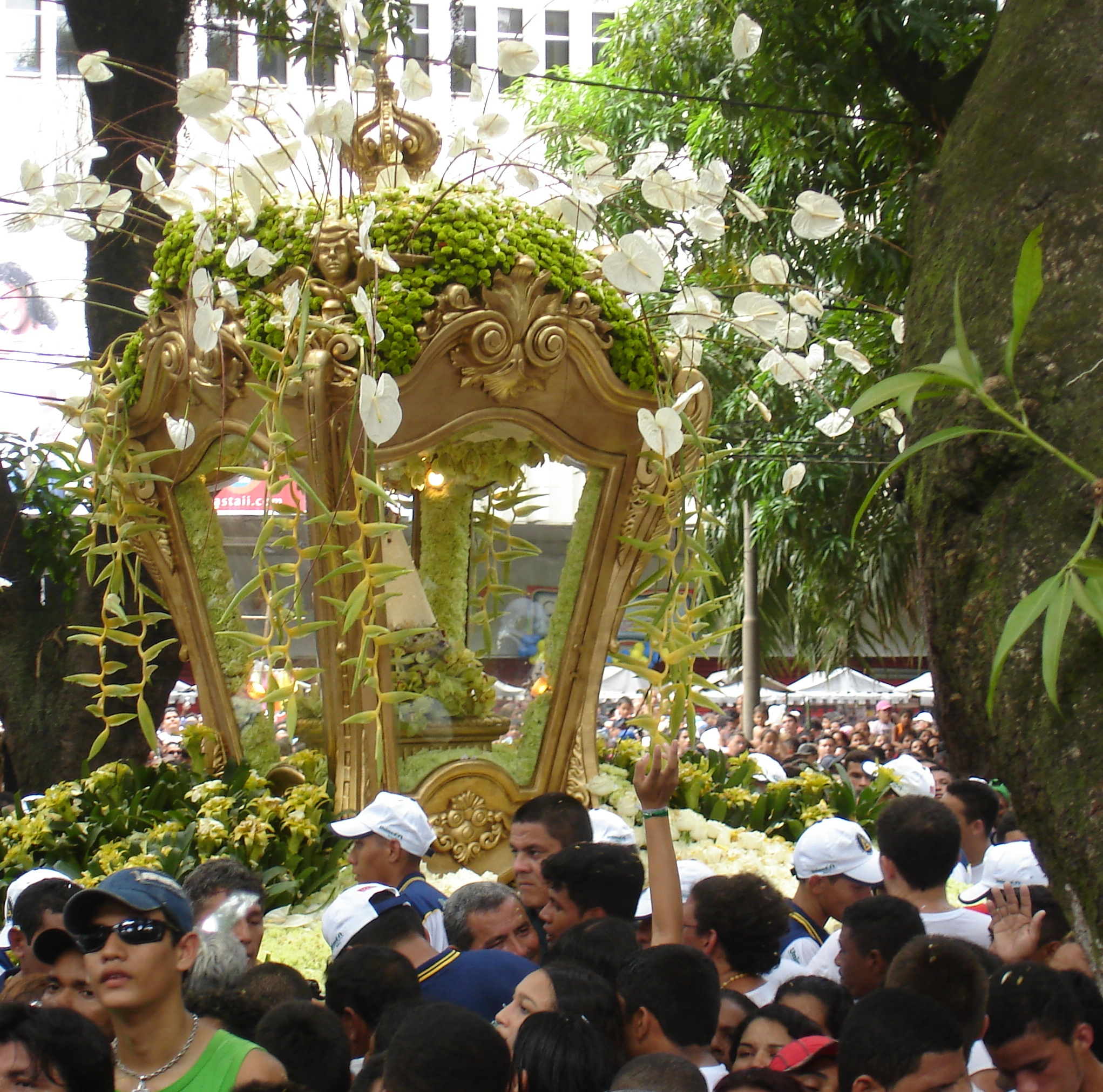 Our Lady of Nazareth’s Taper. Belém, Pará, Brazil / Círio de Nossa Senhora de Nazaré